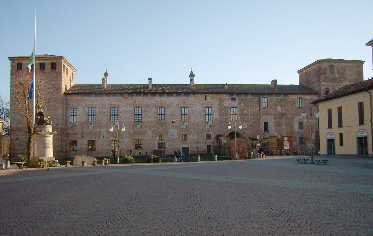 Il castello visconteo di Melegnano